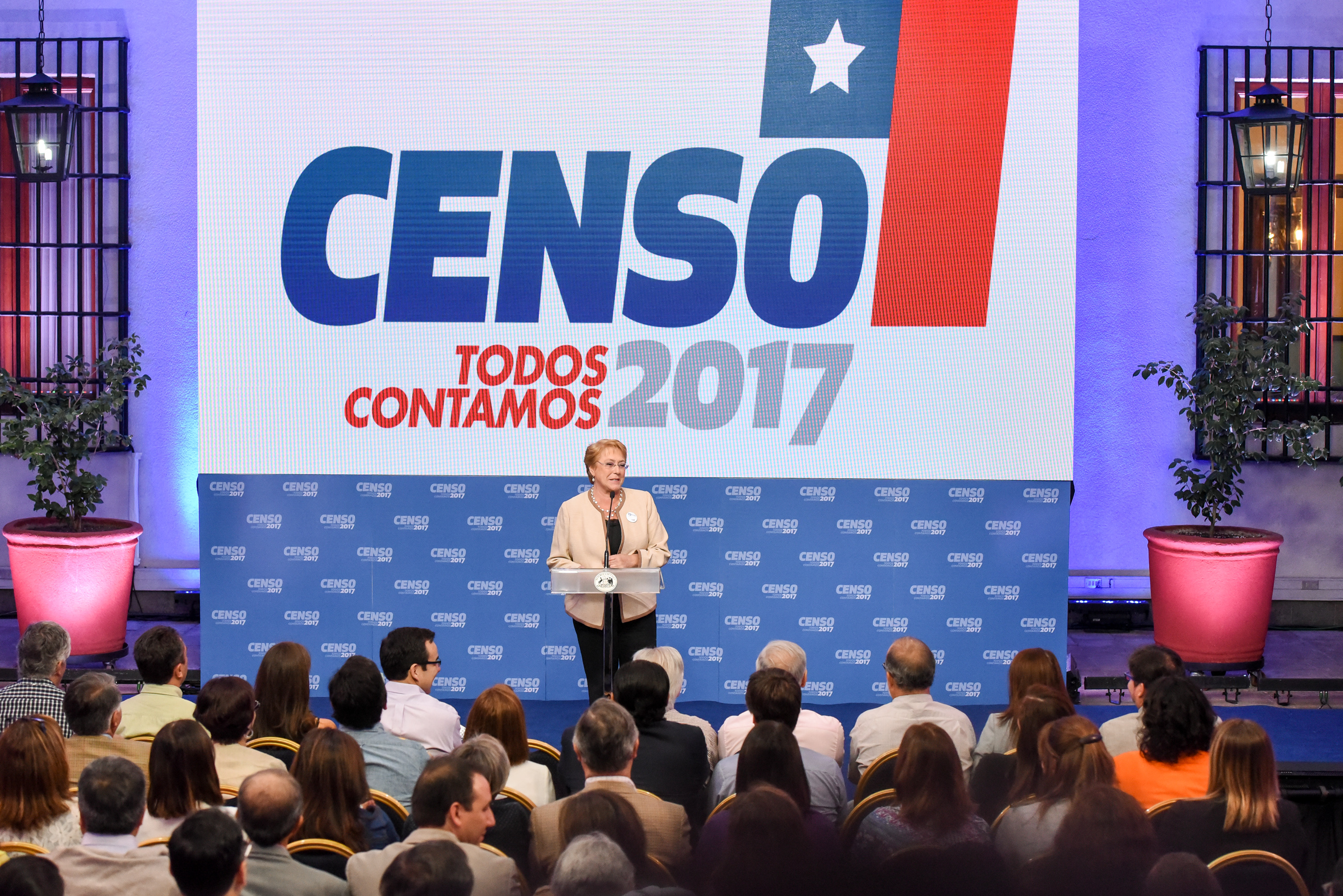 Ministra Paula Narváez participa en capacitación para el Censo 2017